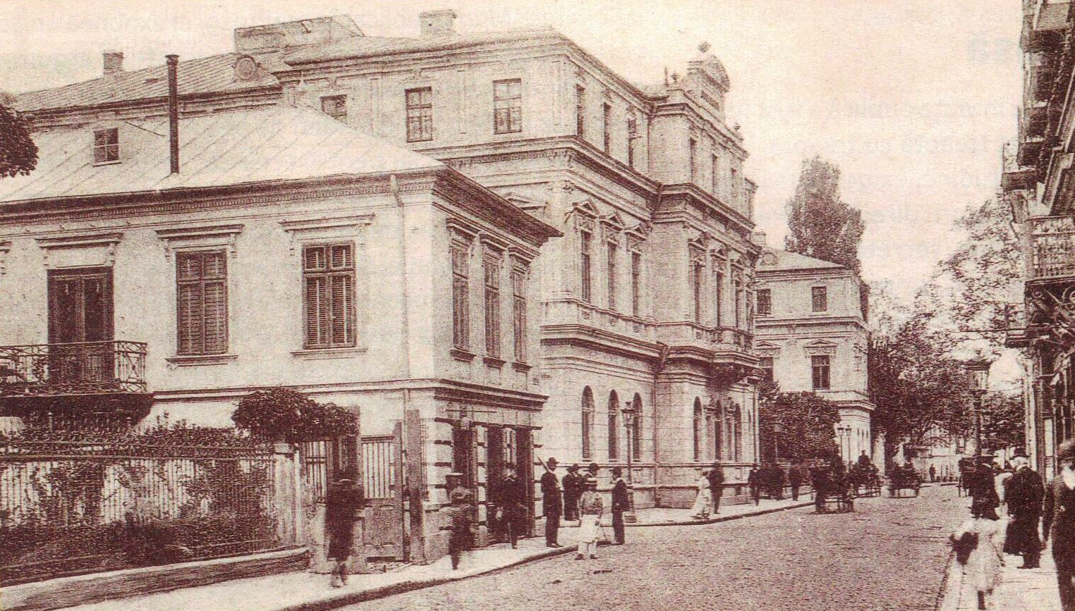 Sediul Ministerului de Finanțe, România în jurul anului 1900 (Fostul Palat Romanit, început în 1812 - finalizat în 1834)